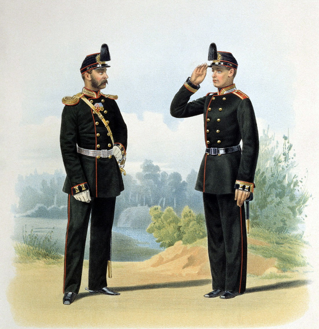 Обер-офицер и юнкер Михайловского Артиллерийского училища 24 мая 1864 года в парадной форме